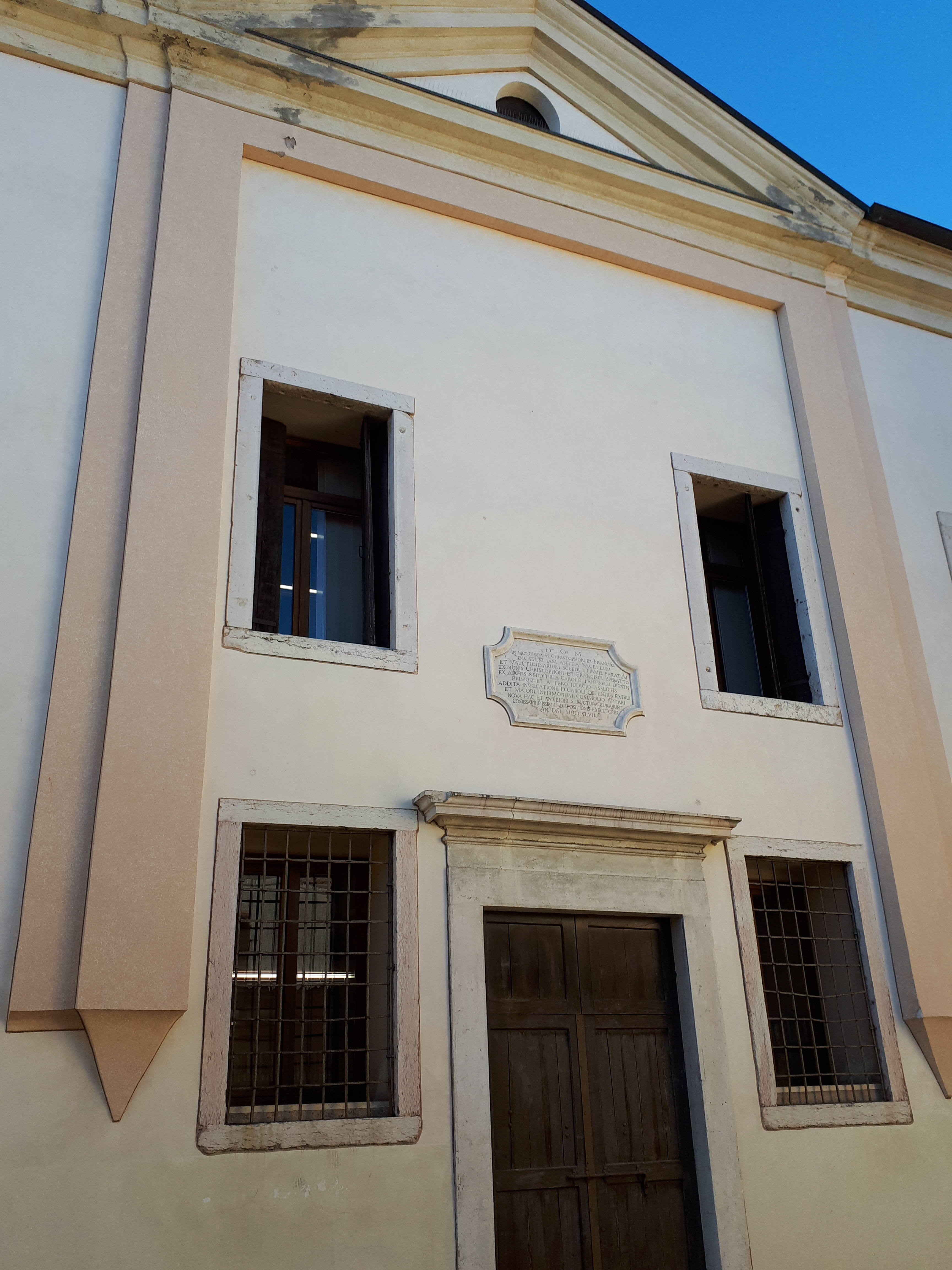 chiesa dell'Ospedale Bratto